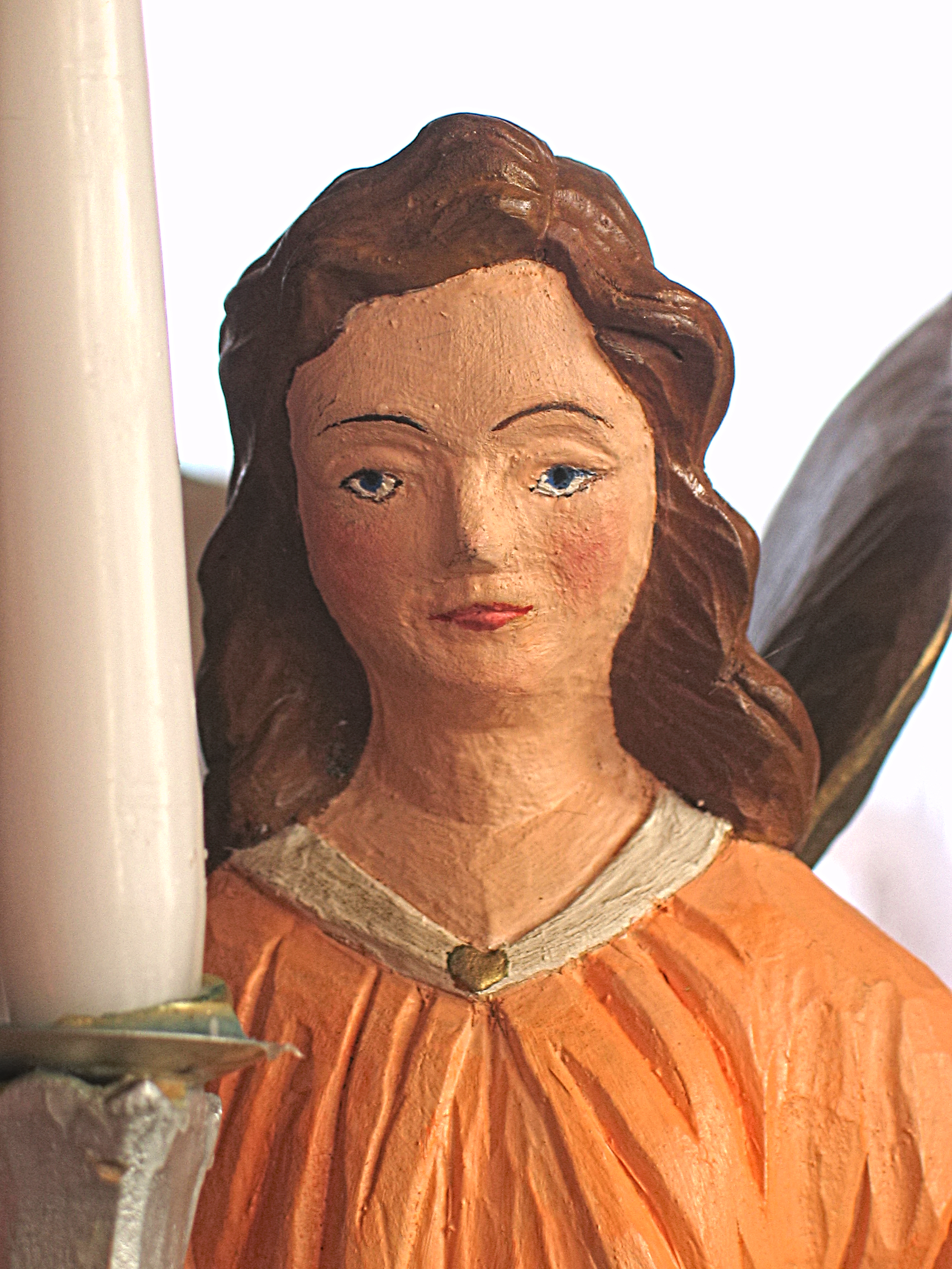 Lichterengel, geschnitzt; Erzgebirge vor 1950 ca. 60 cm hoch